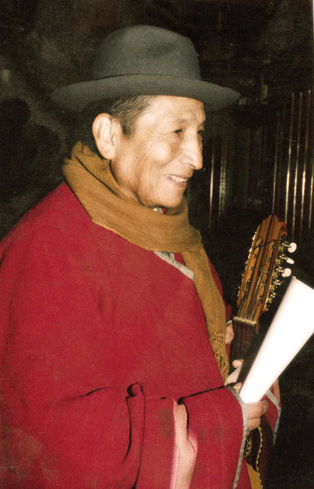 pagina humire